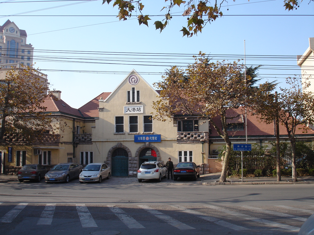 青岛大港火车站